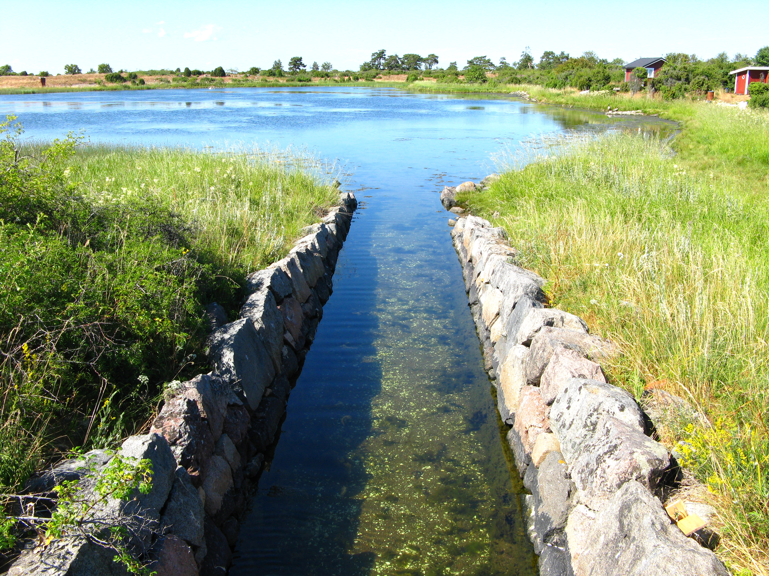 Kanalförsett glo på ön Furön utanför Oskarshamn.